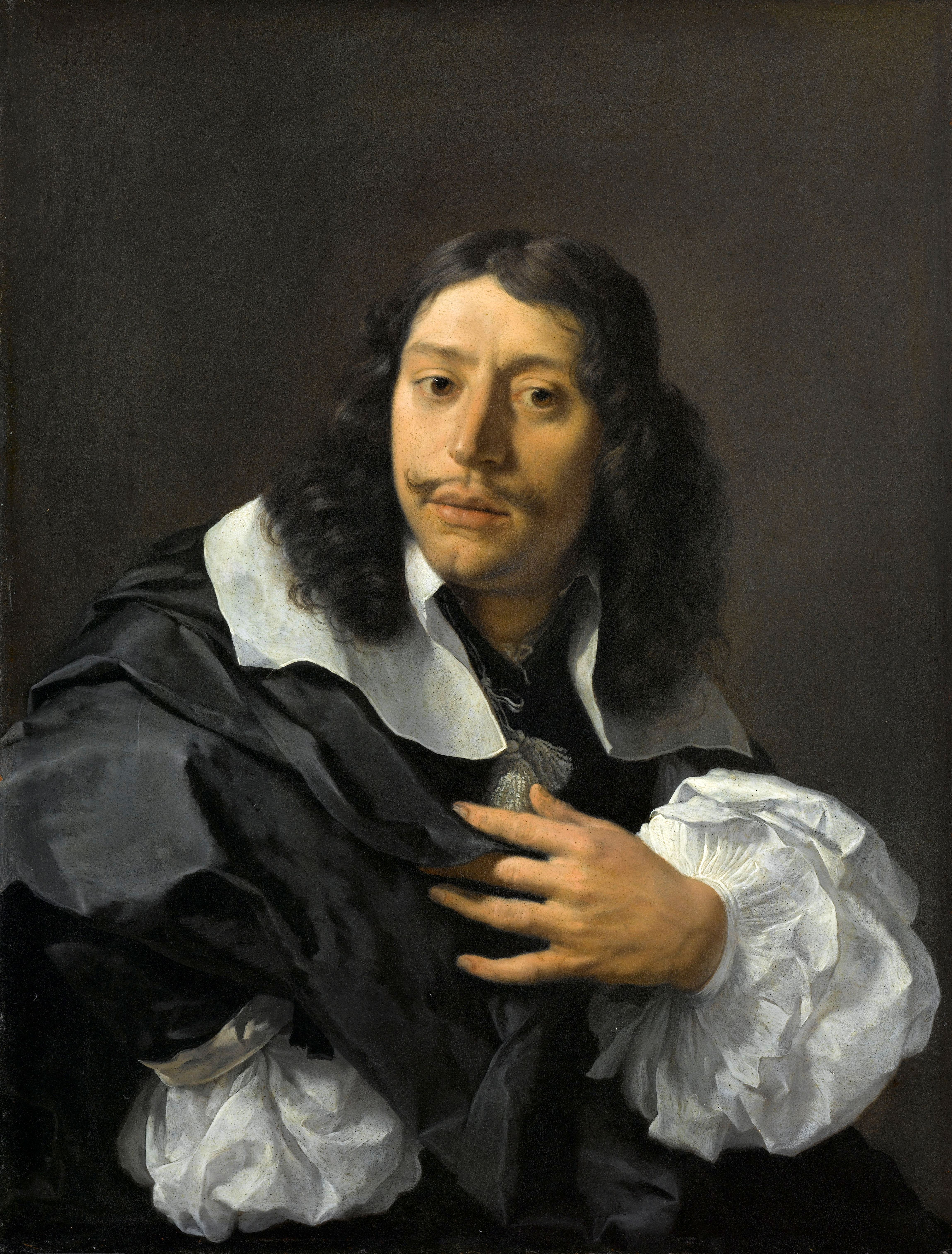 Zelfportret van de schilder Karel Dujardin. Ten halven lijve, de linkerhand op de borst, met grote witte pofmouwen.